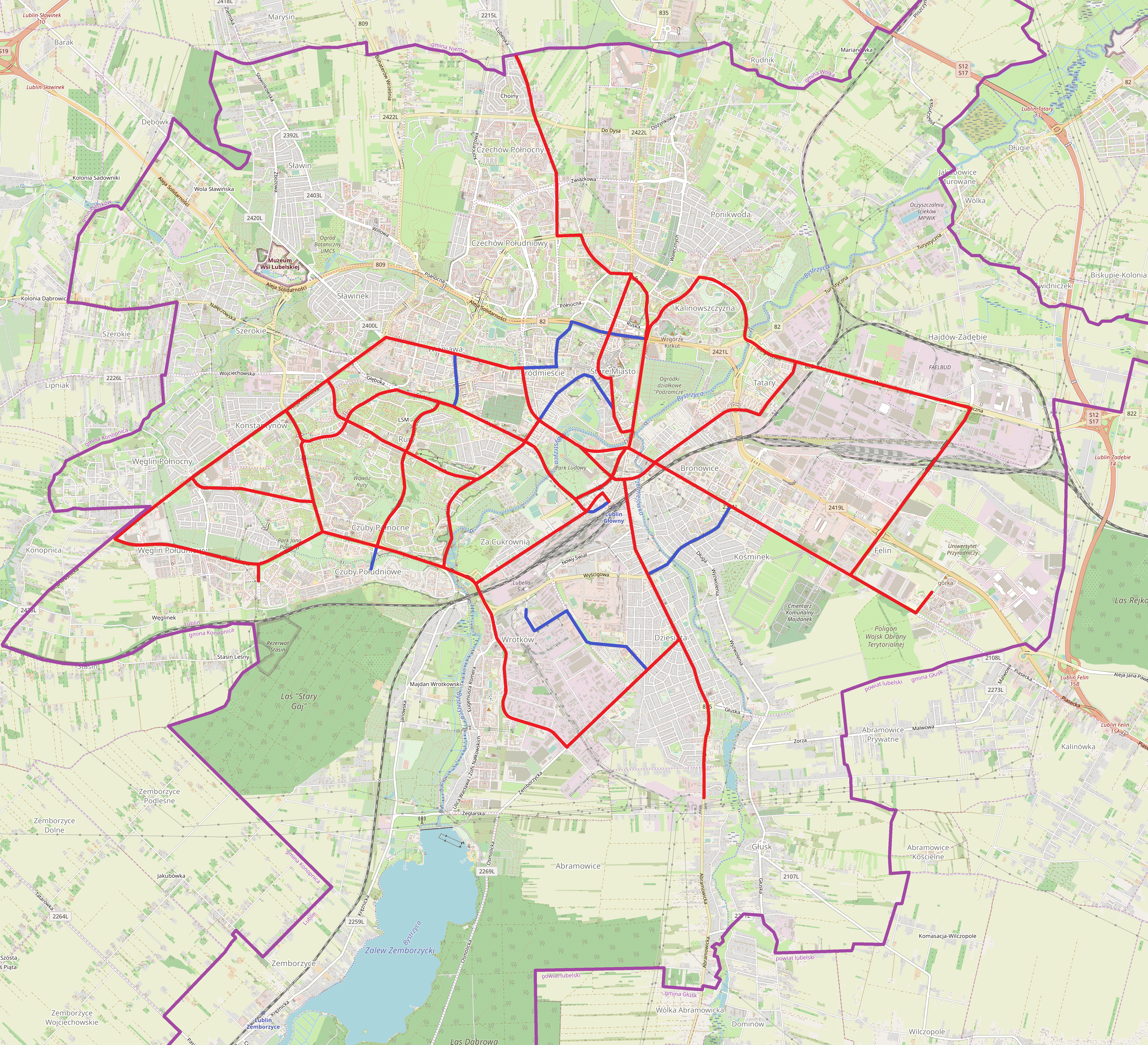 Schemat przebiegu linii trolejbusowych w Lublinie This map of Lublin was created from OpenStreetMap project data, collected by the community. This map may be incomplete, and may contain errors. Don't rely solely on it for navigation.